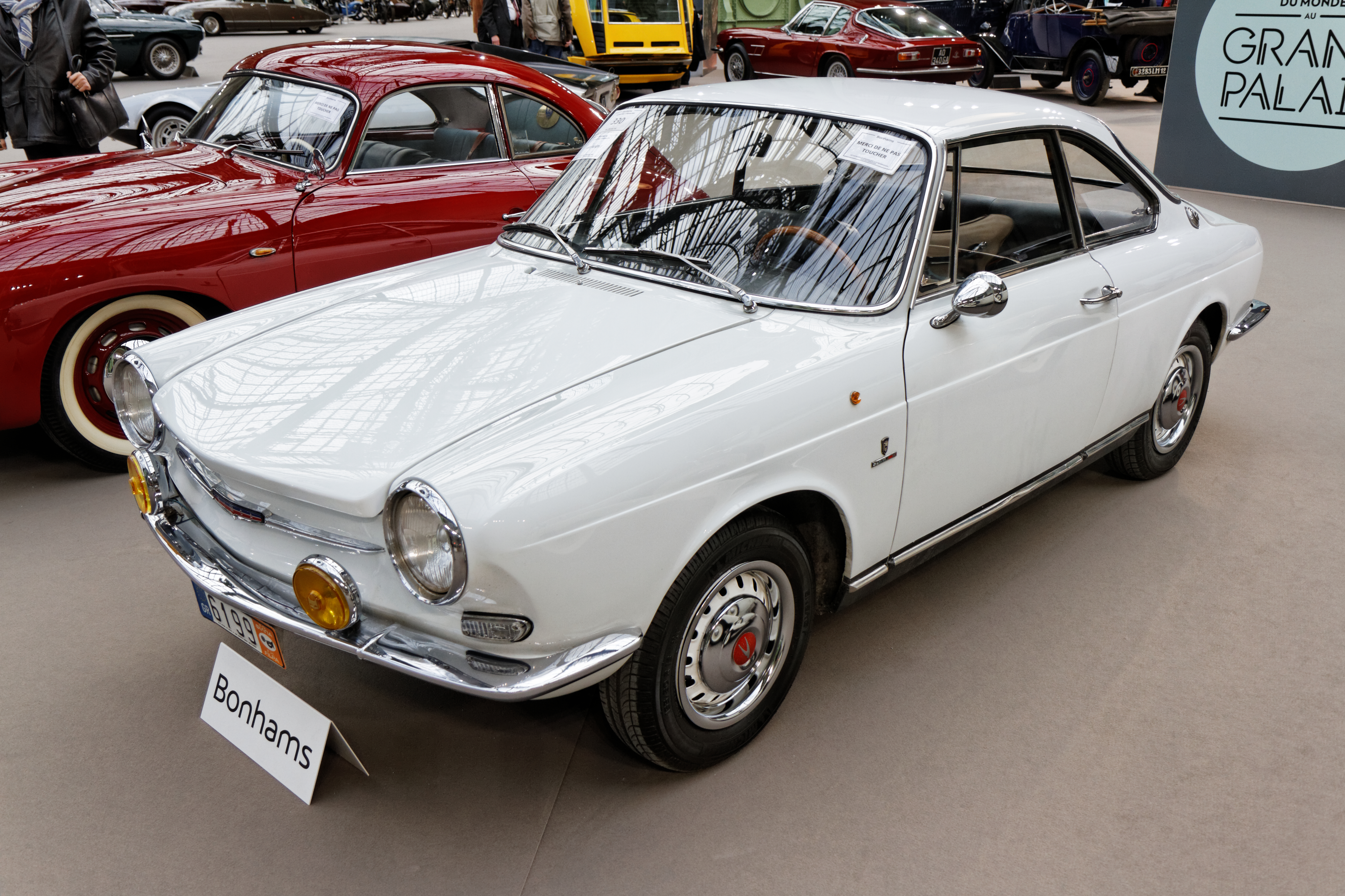 Une Simca 1000 Coupé au Grand Palais lors de la vente Bonhams en février 2014.